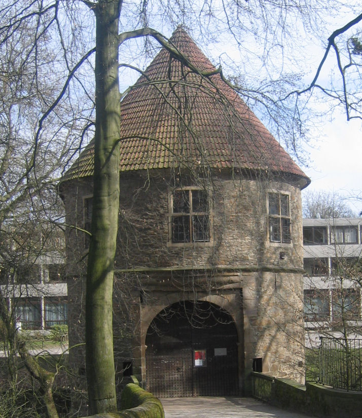 Städtische Galerie, Torhaus Rombergpark, Dortmund